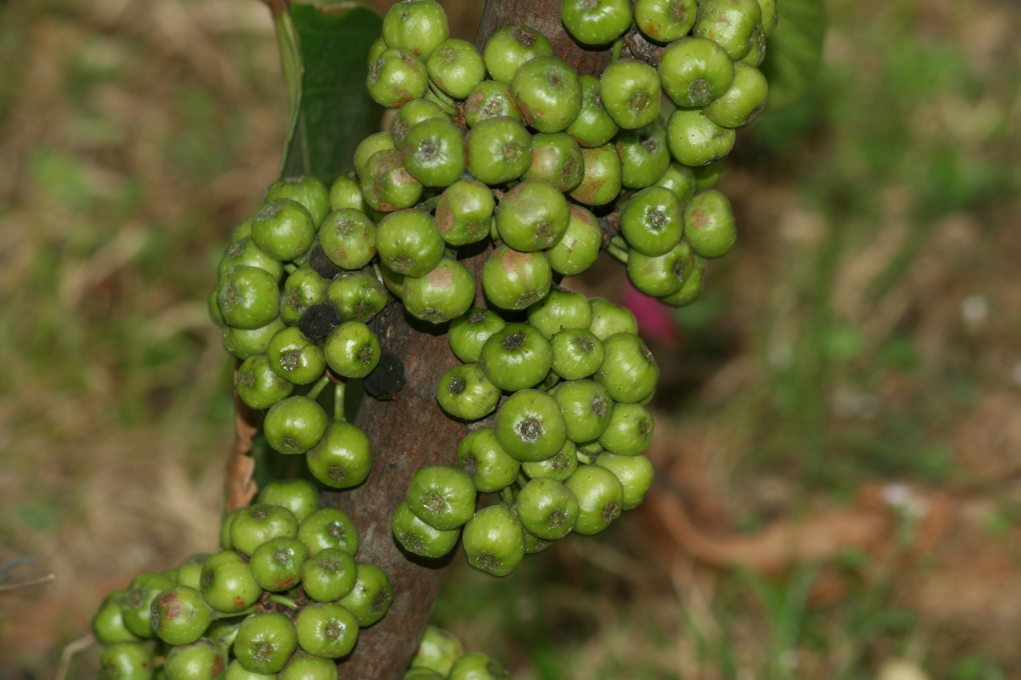 中文（香港）: 水同木（學名：Ficus fistulosa）的無花果，攝於香港西貢獅子會自然教育中心